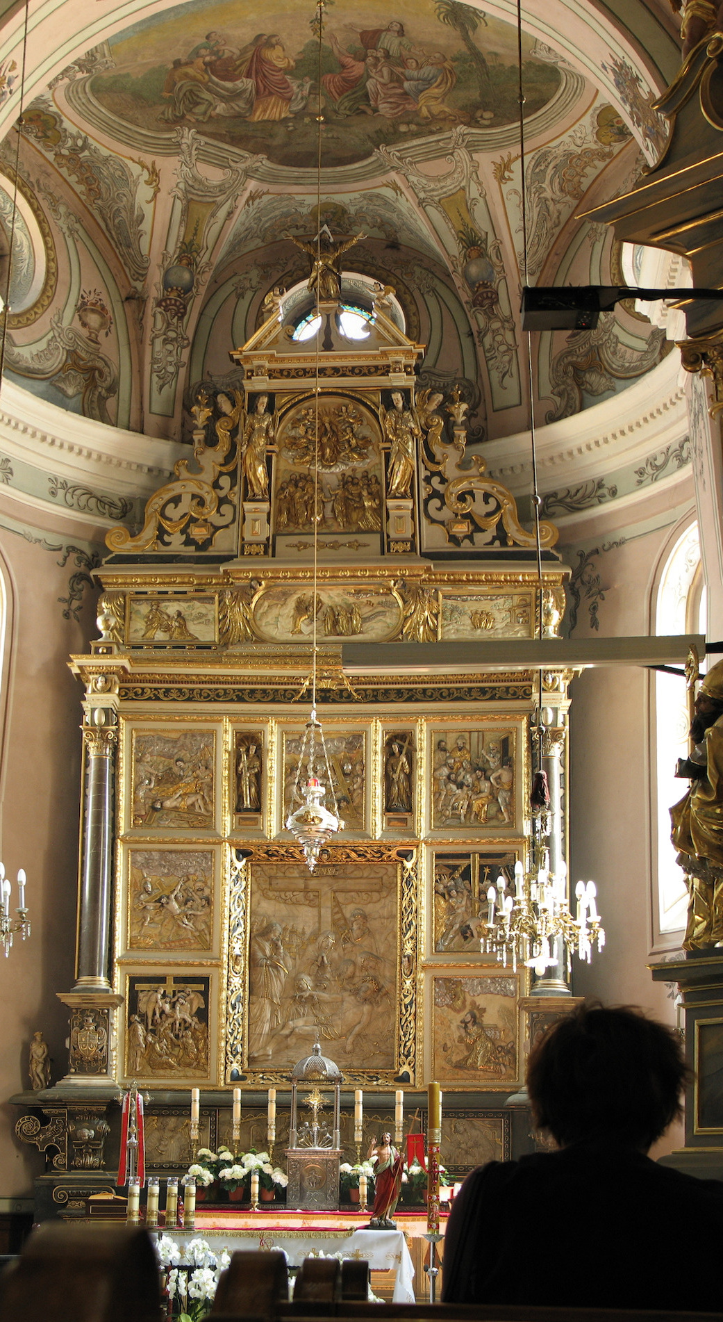 Ołtarz główny w bazylice Wniebowzięcia Najświętszej Marii Panny w Rzeszowie.